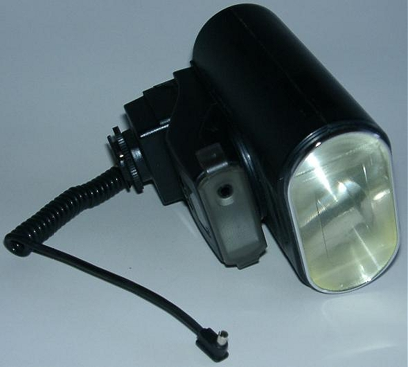 Bild på en fotoblixt. Foto:sv:Användare:Chrizz